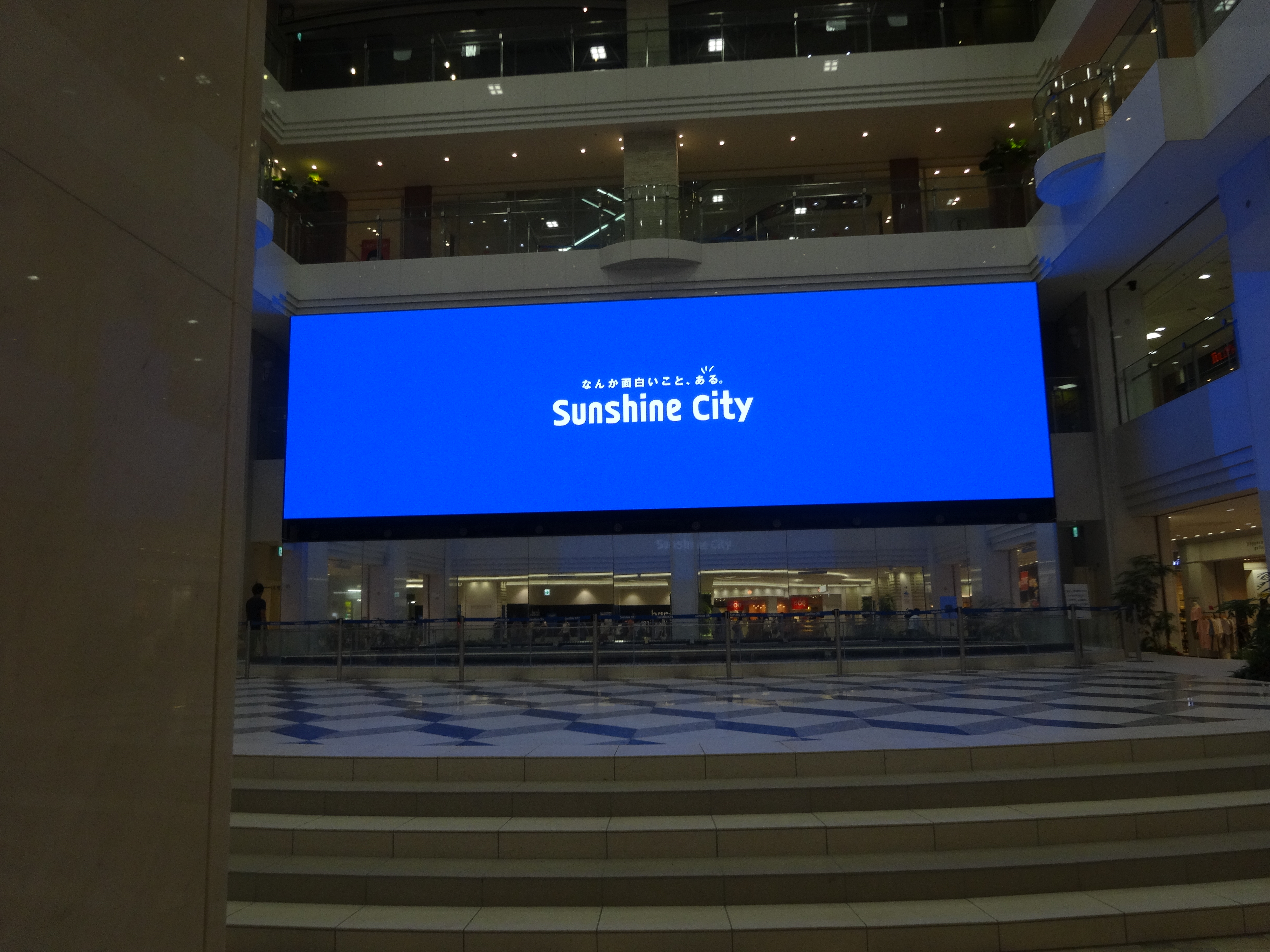 池袋駅近くに所在するサンシャインシティ･専門店街アルパ内にある噴水広場。アイドルイベントの聖地として知られ、2016年4月にリニューアルし大型モニターが設置された。